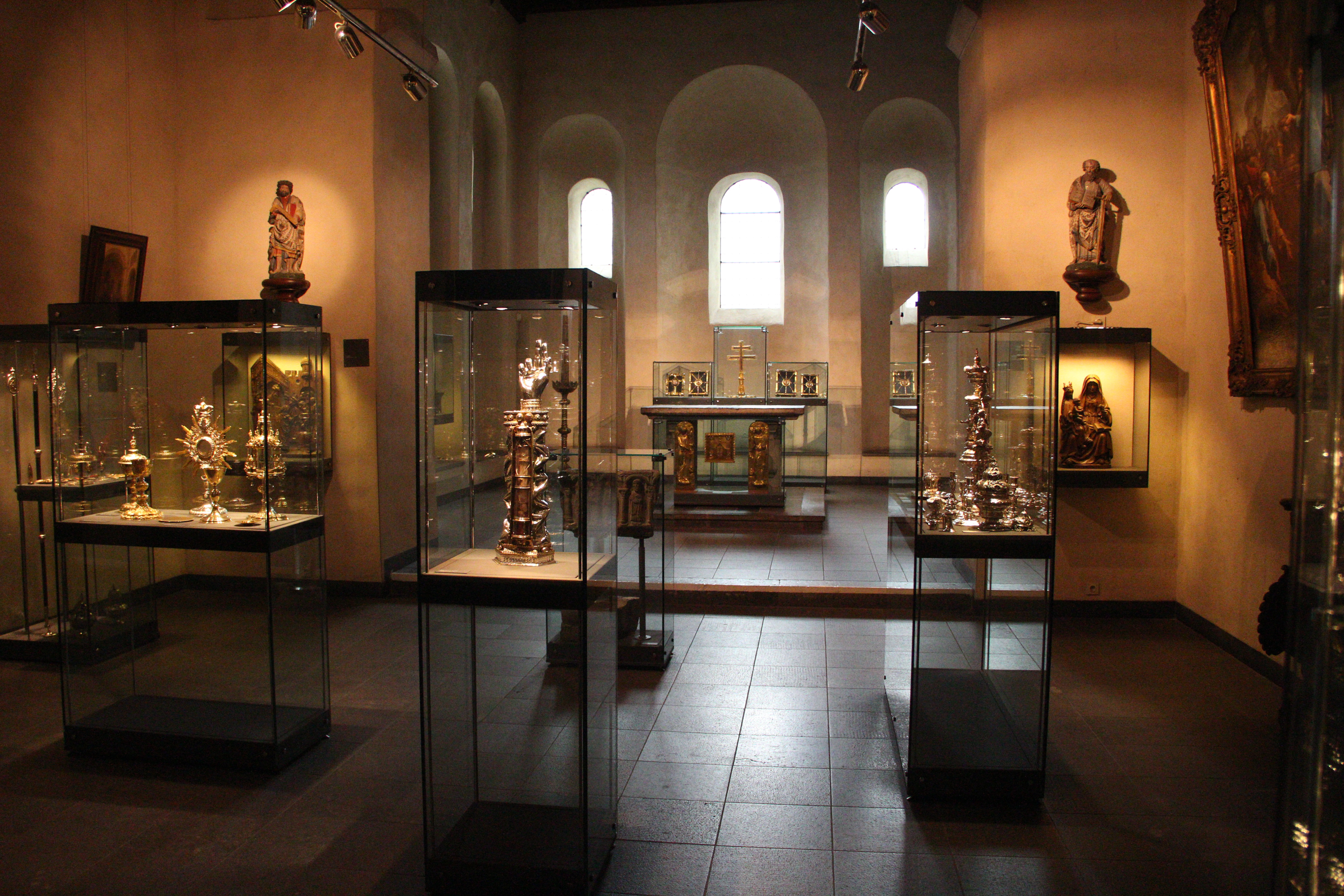 Schatkamer van de Sint-Servaasbasiliek (Maastricht)